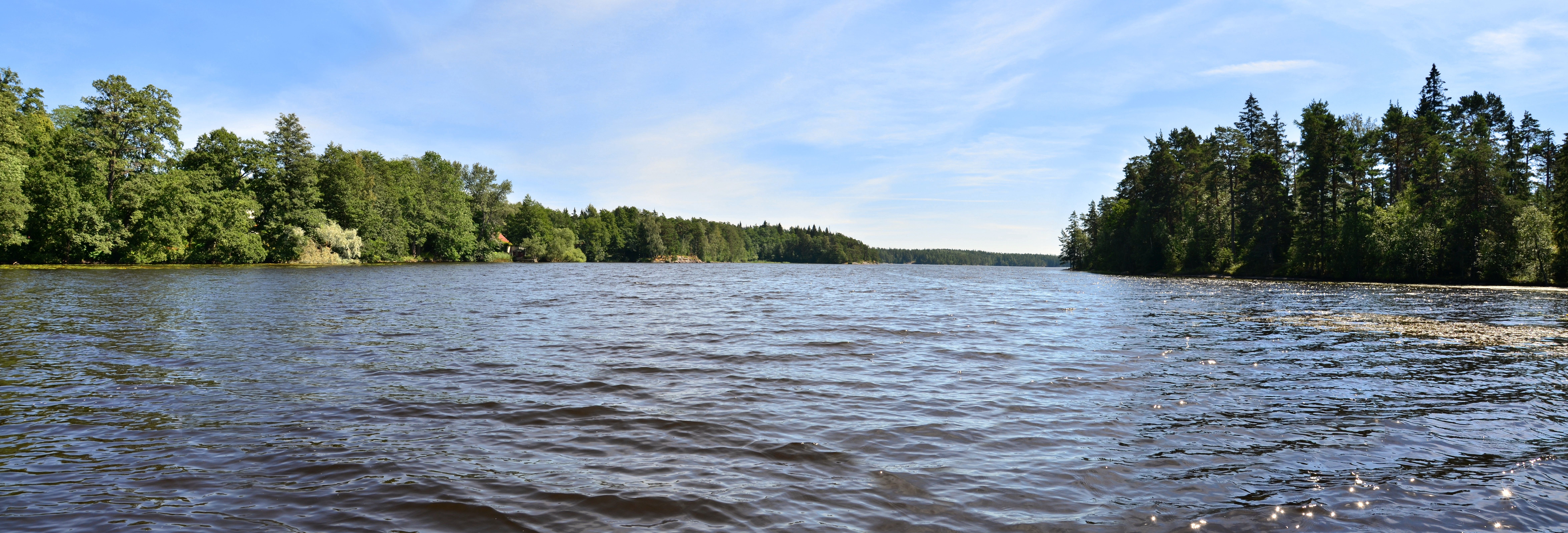 Björkboda träsk, Björkboda, Finland.